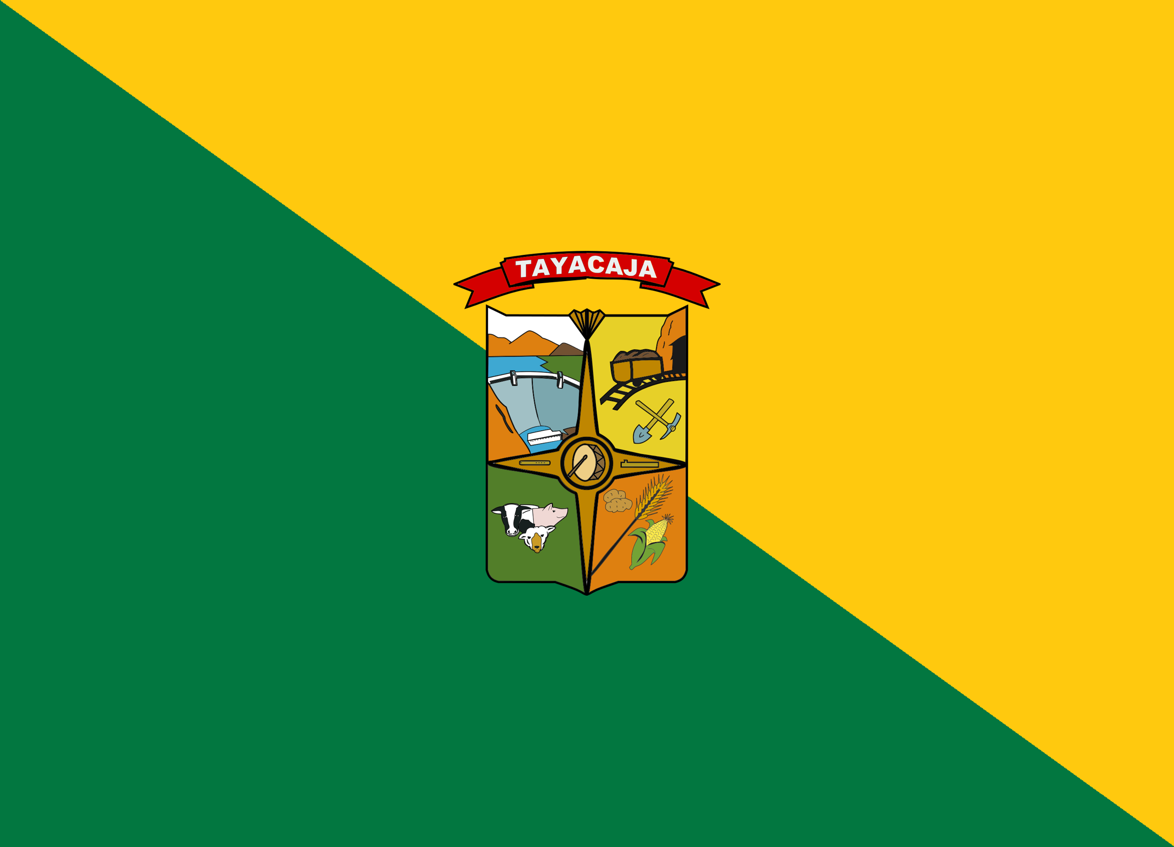 Bandera de la Provincia de Tayacaja en Huancavelica